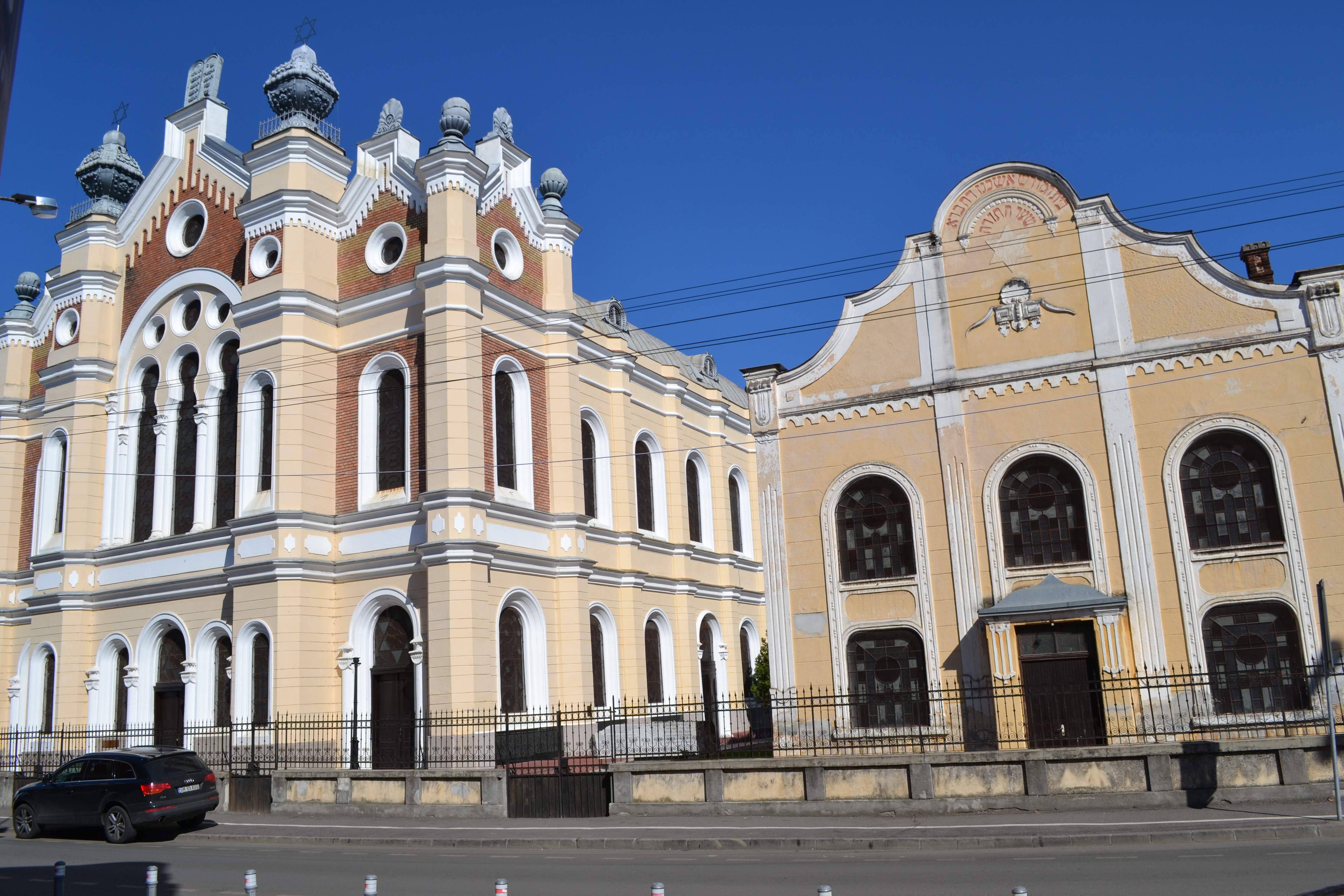 Ansamblul sinagogii